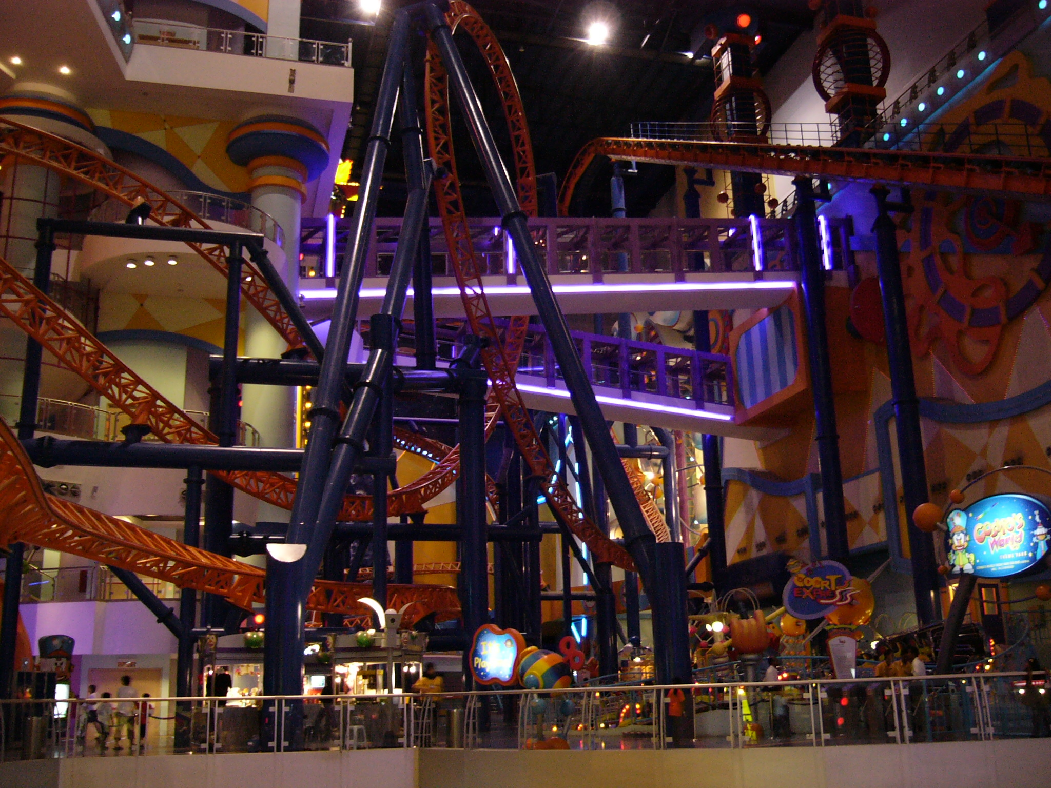 Berjaya Times Square - Asias biggest Indoor Theme Park in Kuala Lumpur